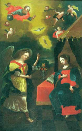 Звеставанне. ХVІІІ стагоддзе. Касцёл Звеставання (брыгіцкі). Гродна